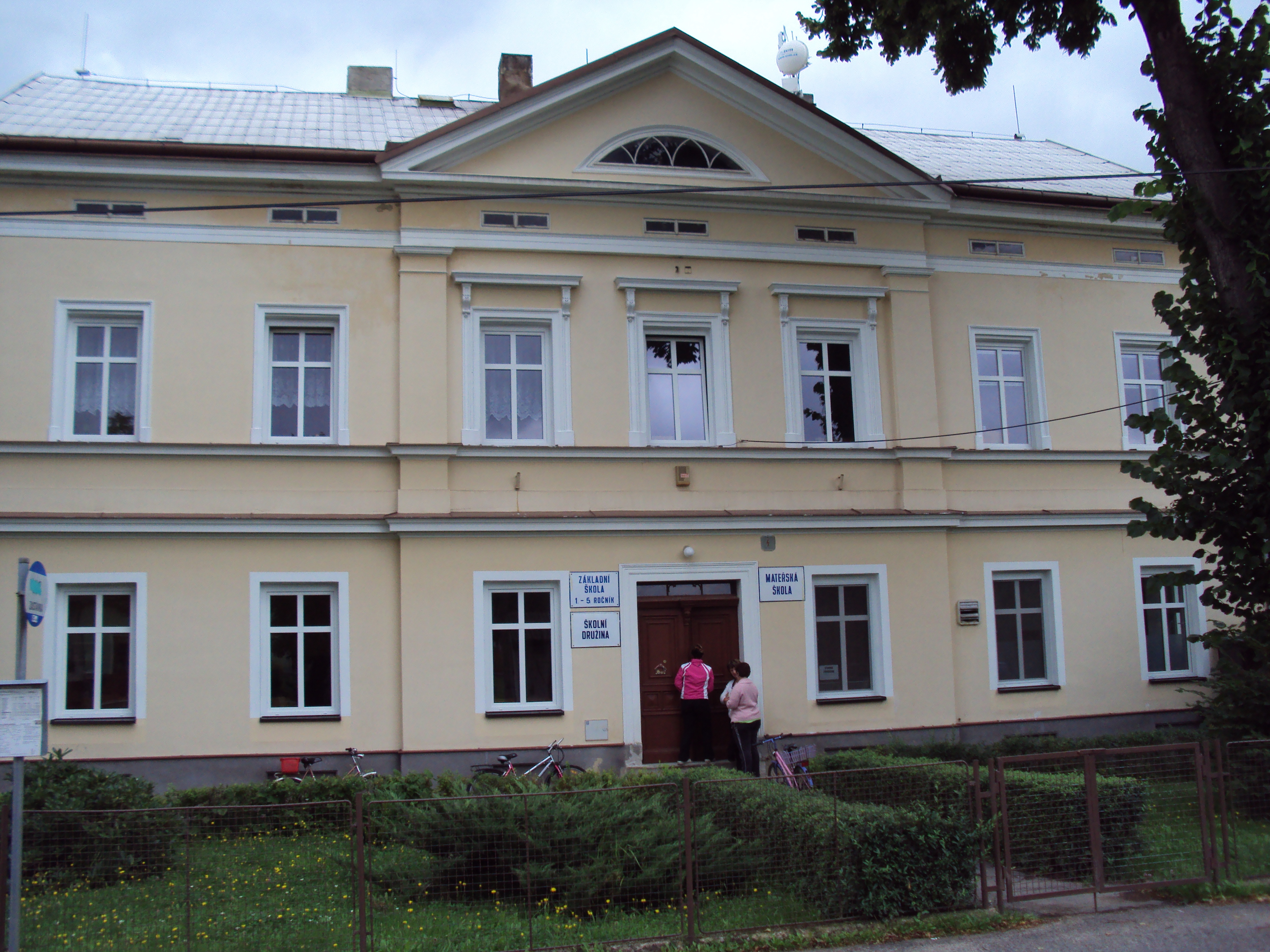 Budova základní a mateřské školy obce Horní Libchava